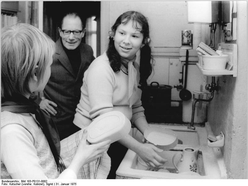 Berlin, JP einem Rentner im Haushalt helfend ADN-ZB Kutscher 31.1.75 Berlin. Fleißige Pioniere sind Bettina Salih (r) und Gabriela Lamm (l) aus der 5b der Franz-Mett-Oberschule (Stadtbezirk Mitte). Alfred Scheppan (hinten) - er ist Witwer - und andere ältere Bürger werden von ihnen betreut. Für sie ist es immer eine besondere Freude, wenn der Timur-Trupp kommt. Denn die beiden Mädchen nehmen ihnen nicht nur kleine Hausarbeiten ab, sondern berichten auch gerne von ihren Schulerlebnissen und den Pioniernachmittagen.